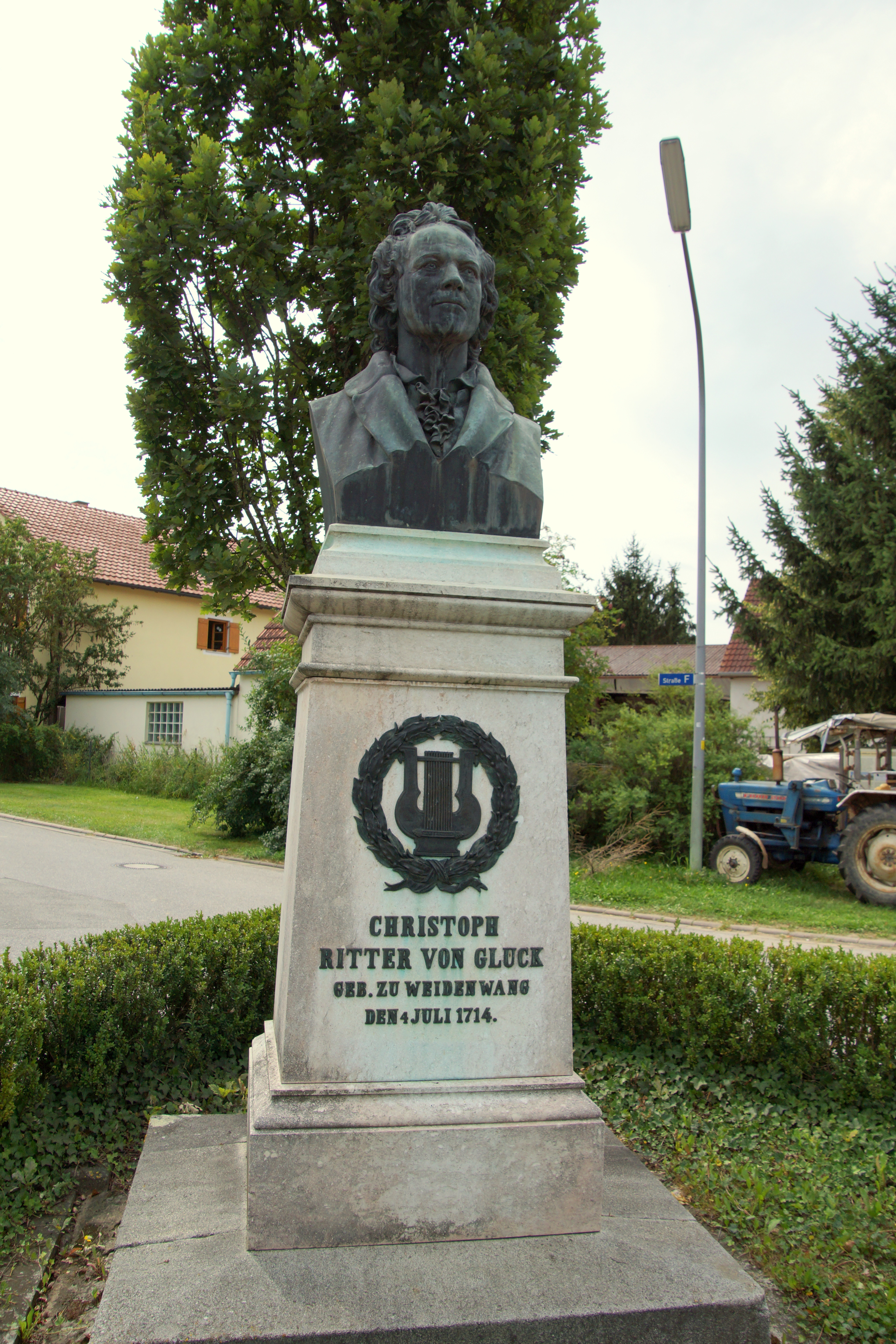 Das Denkmal für den in Weidenwang (oder im Nachbarort Erasbach) geborenen Komponisten Christoph Willibald Gluck stammt von dem Münchner Bildhauer Konrad Knoll aus dem Jahr 1870.